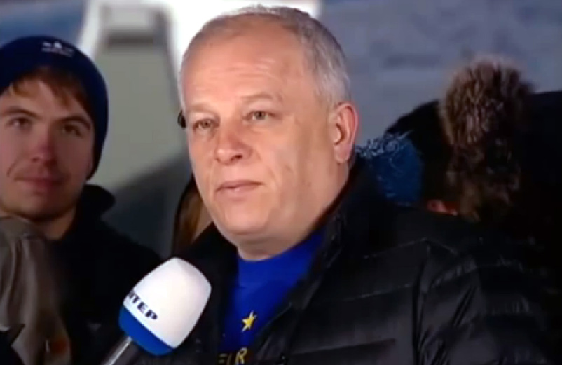 Кубів Степан Іванович, український політик та громадський діяч, голова Національного банку України (24 лютого — 19 червня 2014), народний депутат України 7-го скликання (2012–2014), голова Всеукраїнського товариства "Меморіал" ім. В.Стуса, в ефірі програми "Подробиці".